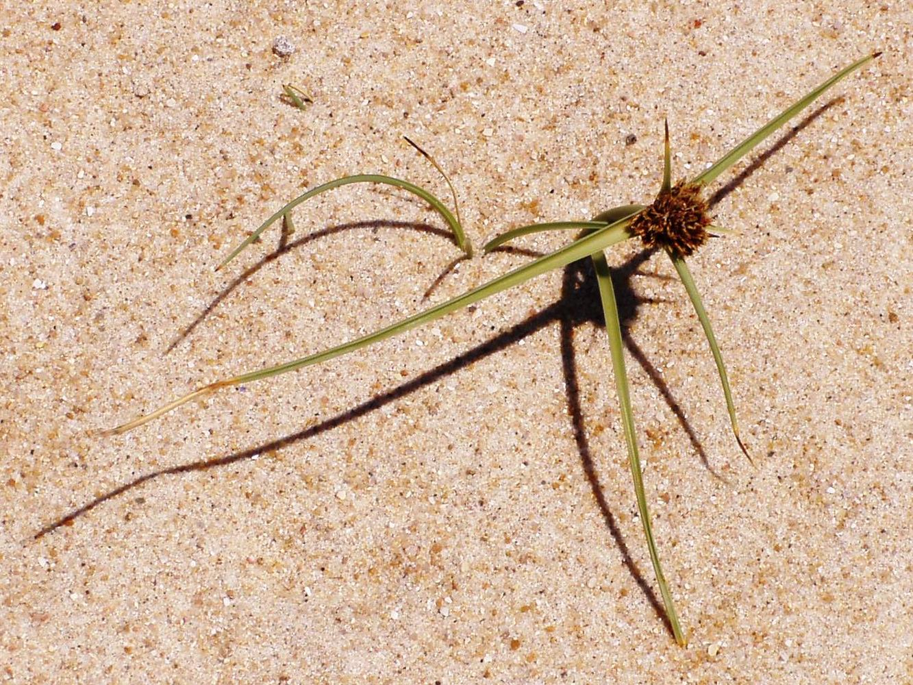 Cyperus capitatus. Nazaré, Portugal.